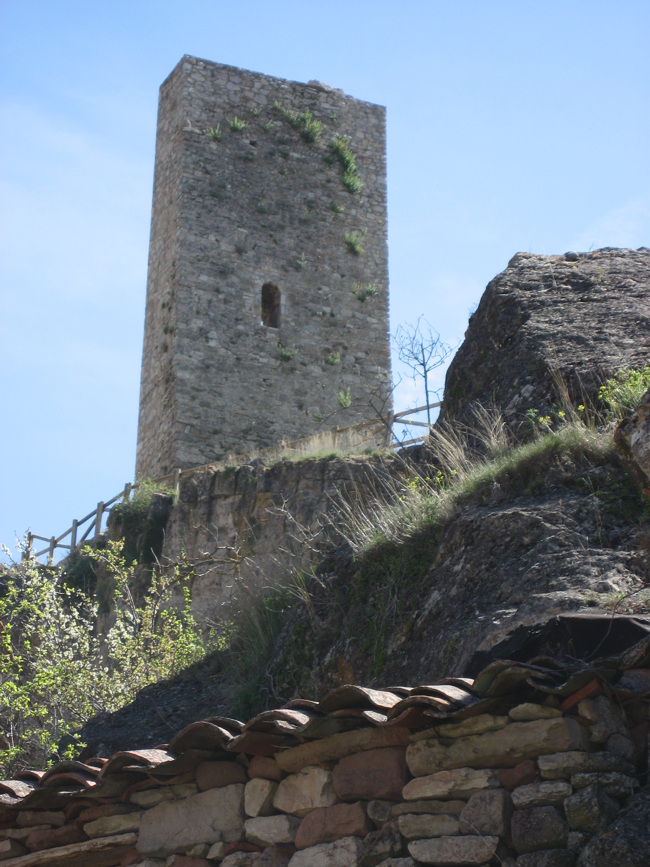 La Torre de la Cigüeña, símbolo de Anguita (Guadalajara). Se trata de un torreón islámico "hisn", que formaba parte de todo un sistema defensivo.